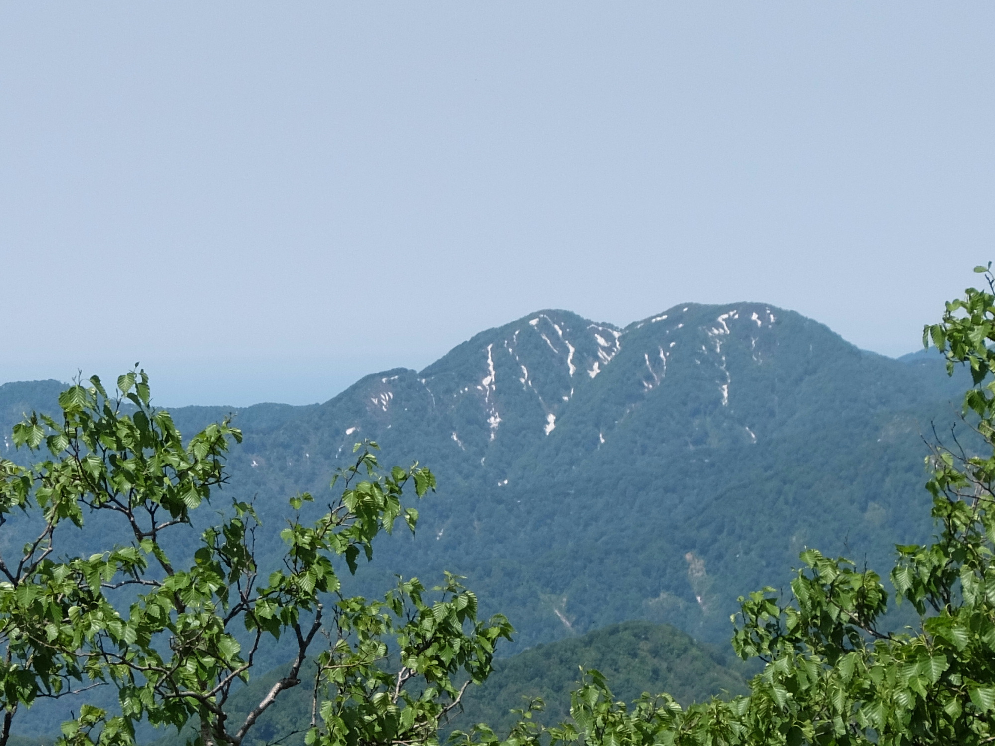 藤里駒ヶ岳より望む二ツ森 背後に日本海が見える